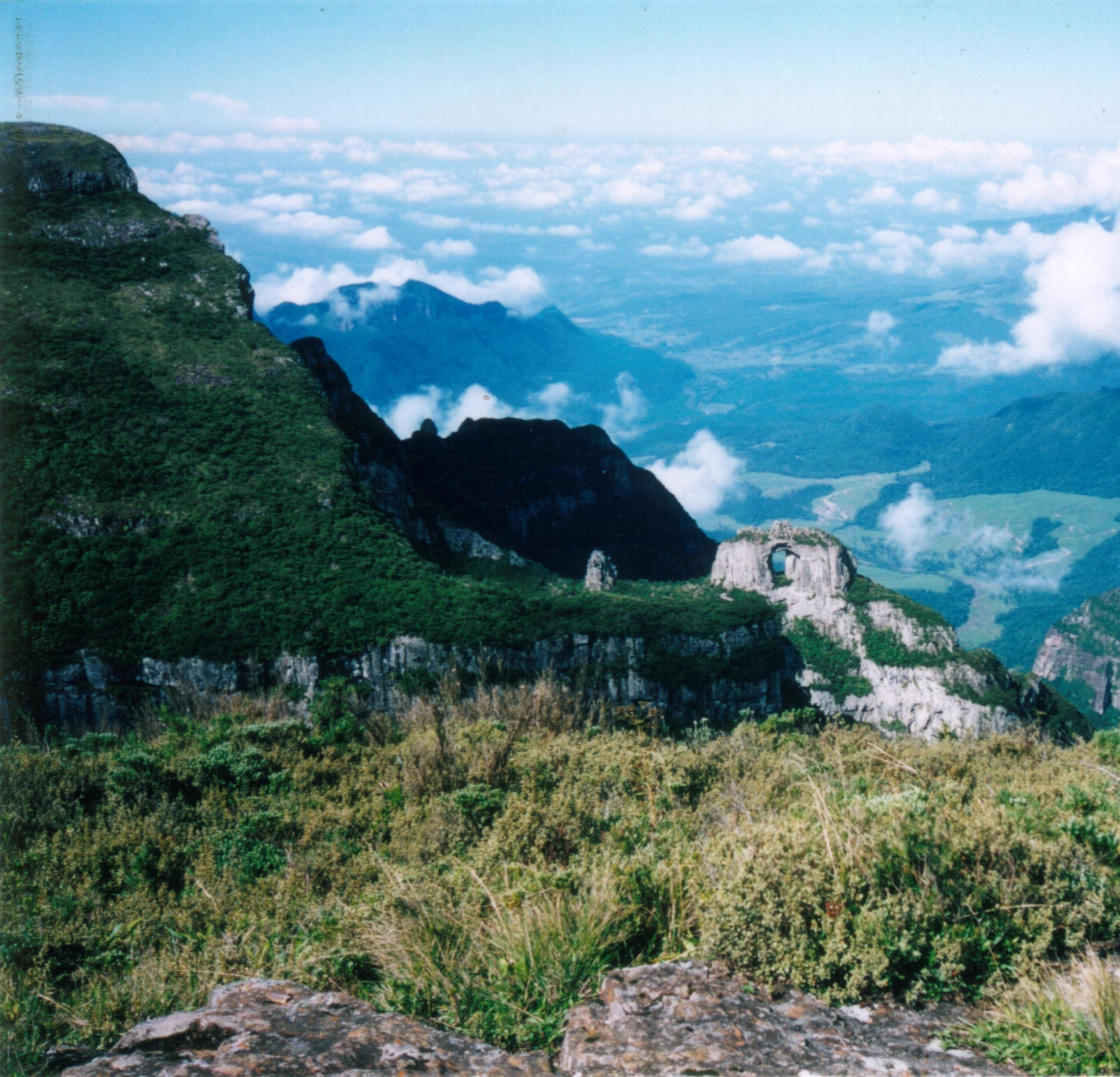 Vue de la Pedra Furada depuis le Morra da Igreja